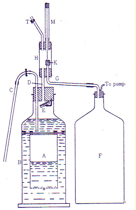 1895年の実験に使ったウィルソンのcloud Chamber.